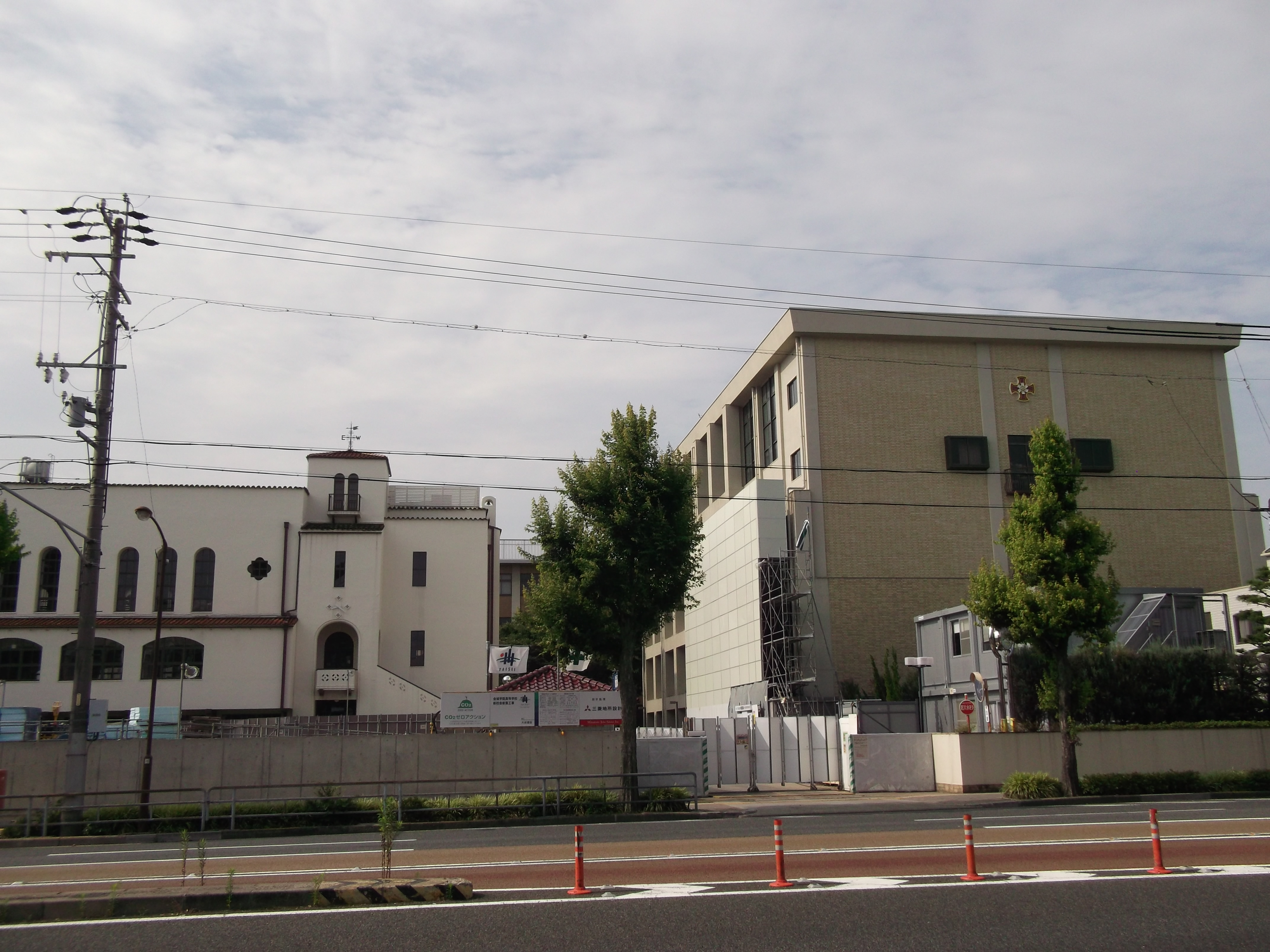 金城学院高校正面